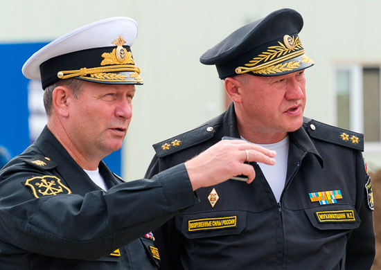 Главнокомандующий Военно-морским флотом Российской Федерации адмирал Виктор Чирков и командующий подводными силами ТОФ вице-адмирал Игорь Мухаметшин в ЗАТО Вилючинск (Камчатка)